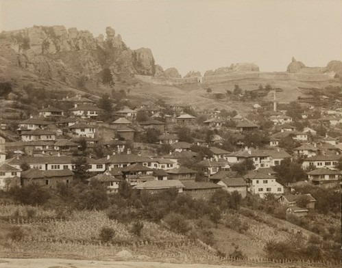 Снимка на Белоградчик